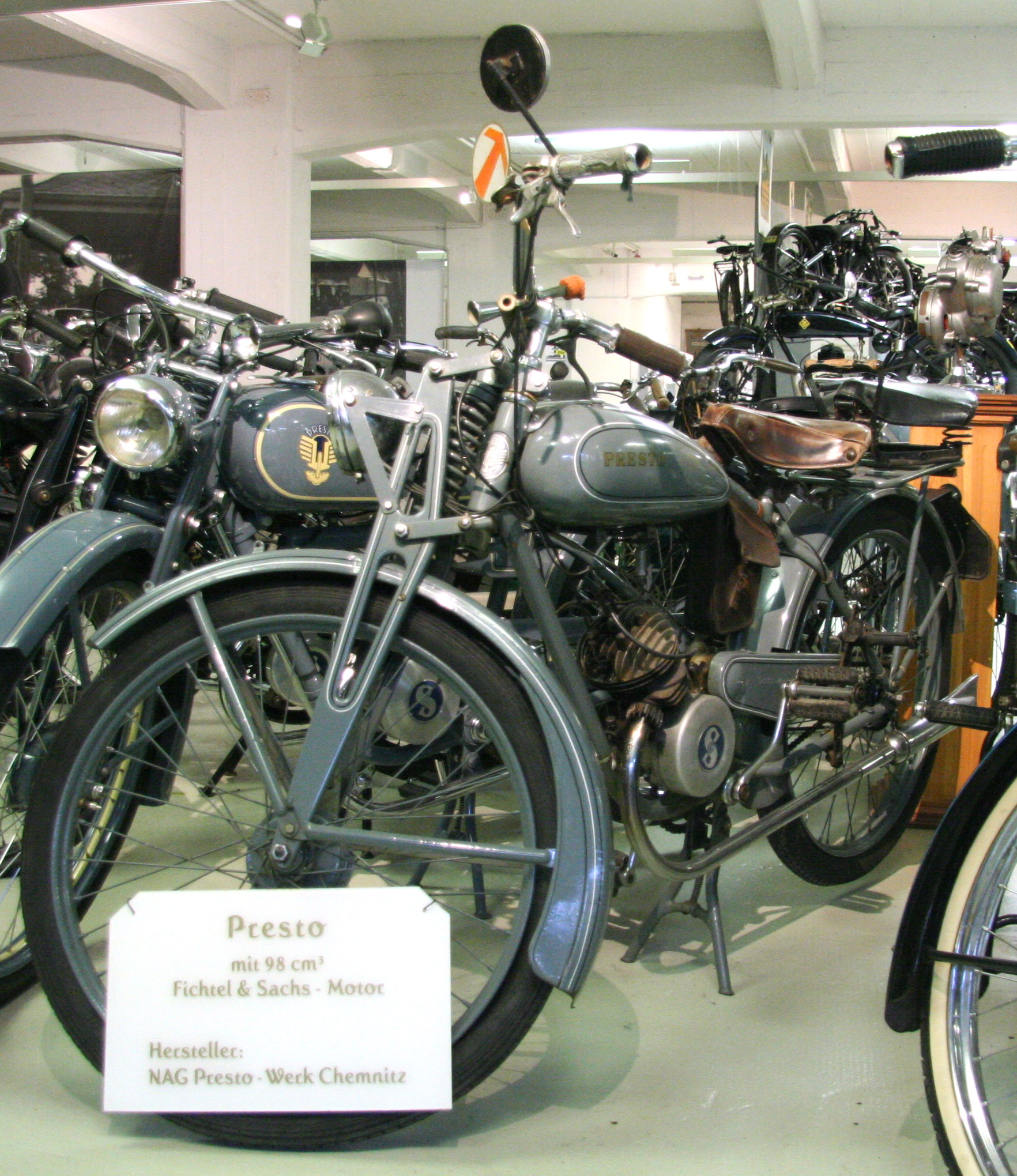 Presto Modell, mit einem Fichtel & Sachs Motor, 98 cm³, Hersteller NAG Presto-Werke Chemnitz, im Museum für sächsische Fahrzeuge in Chemnitz.